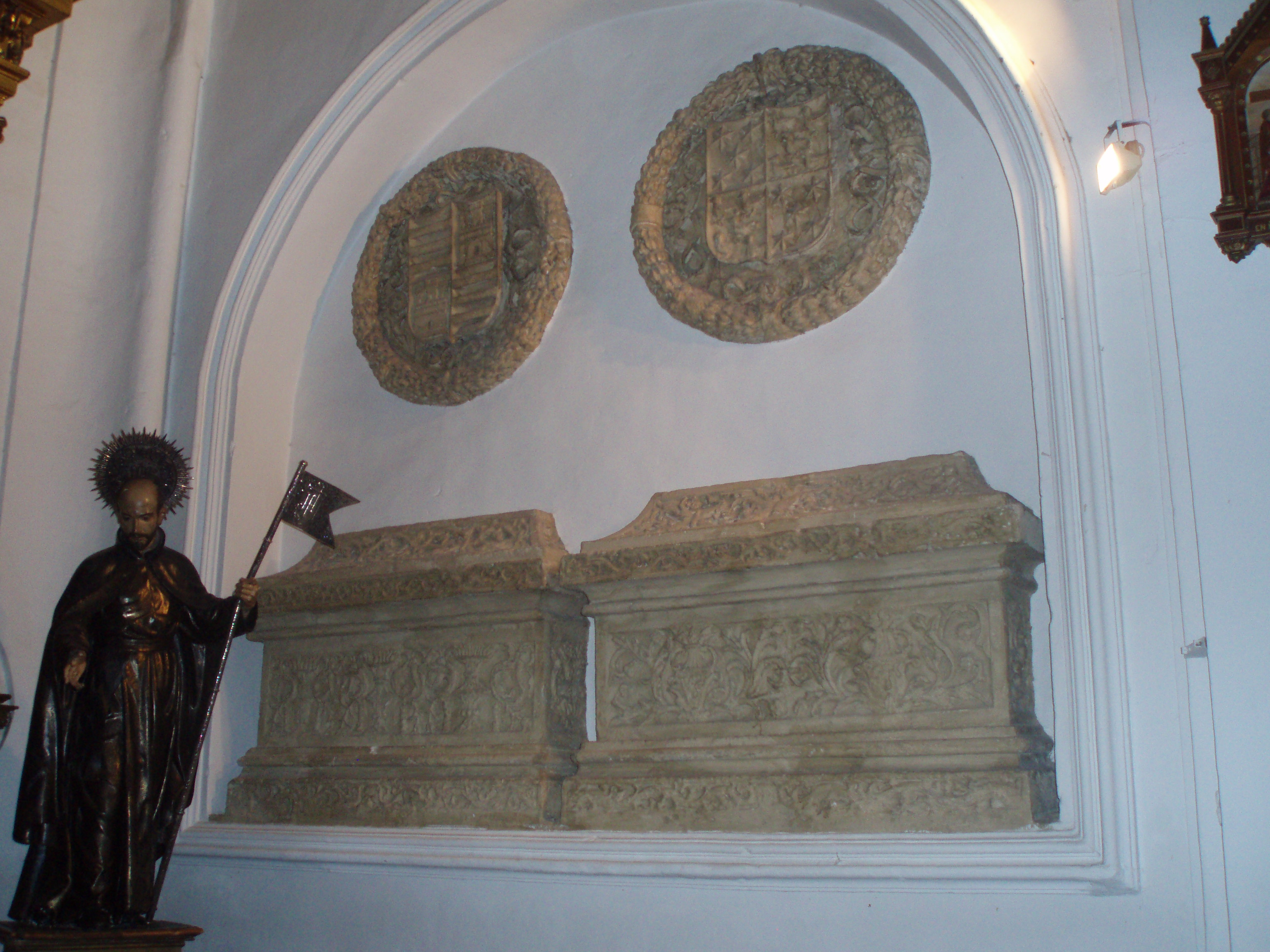 Sepulcros de la familia González de Aguilar y Fernández de Córdoba en una capilla situada en el lado de la Epístola de la iglesia de San Hipólito de Córdoba, provincia de Córdoba, (España).